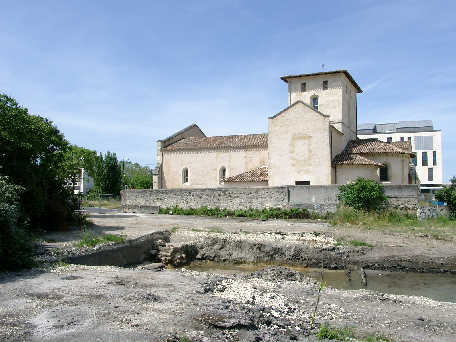 Fouilles archéologiques préventives aux abords de la vieille église du XIVème siècle, avant édification des logements sociaux. Commune de Mérignac, Gironde, France.